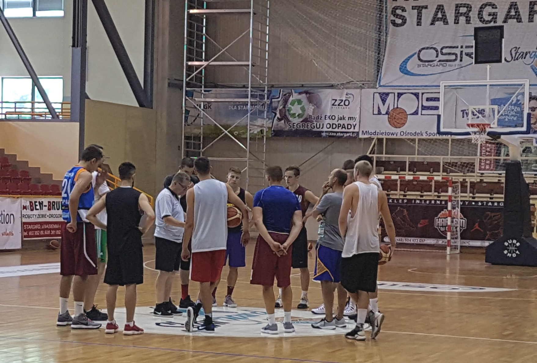 Spójnia Stargard (14.08.2018)